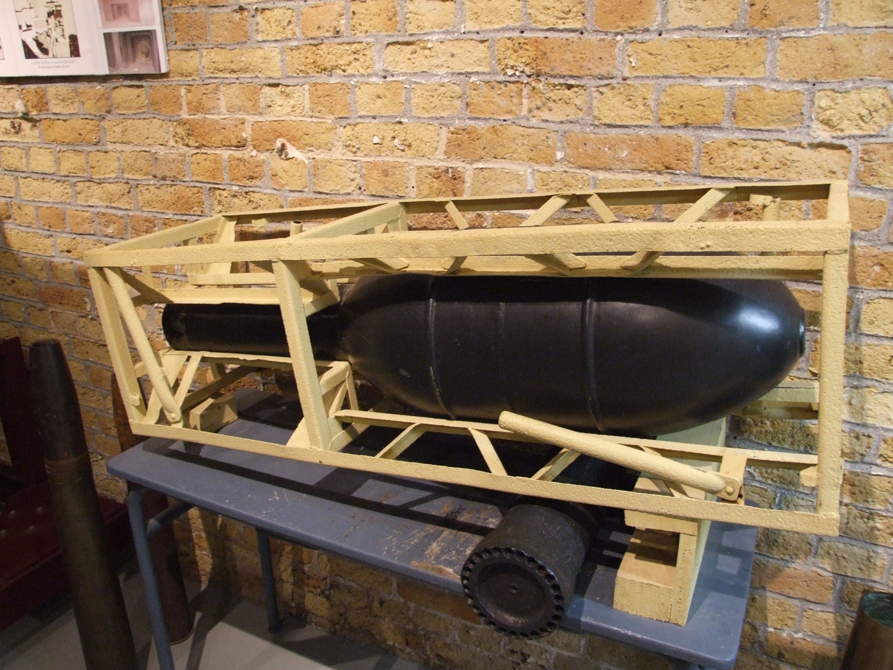 Schweres Wurfgerät 41, Mémorial du Souvenir, Dünkirchen; Wurde bei der Wiedereroberung von Dünkirchen durch deutsche Truppen und nach Eroberung einiger Werfer durch allierte Truppen eingesetzt.